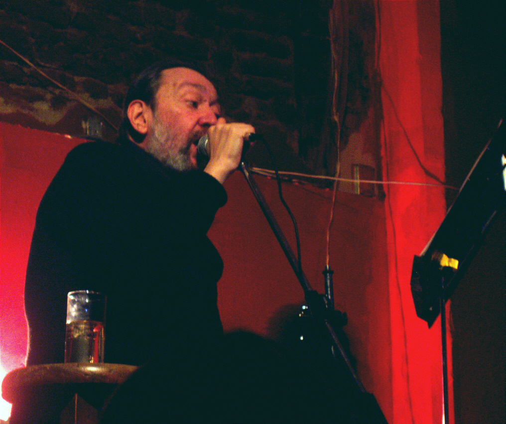 Fotografía del músico uruguayo Eduardo Darnauchans en un espectaculo brindado en "Capiloncho" de Ciudad Vieja (Montevideo - Uruguay).